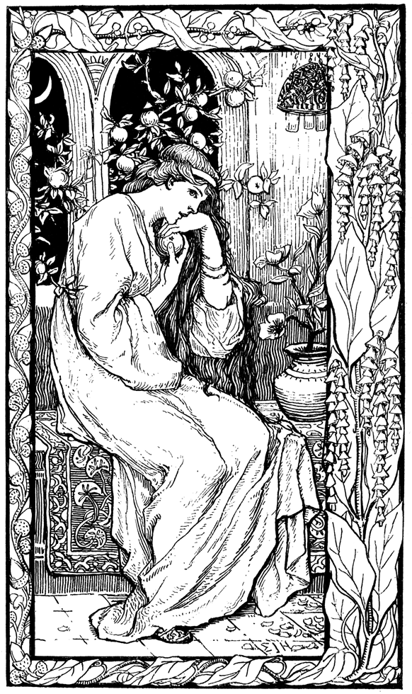 Aleksander Chodźko: Fairy Tales of the Slav Peasants and Herdsmen. Übersetzung aus dem Französischen und Illustrationen von Emily J. Harding. London : : George Allen, 1896